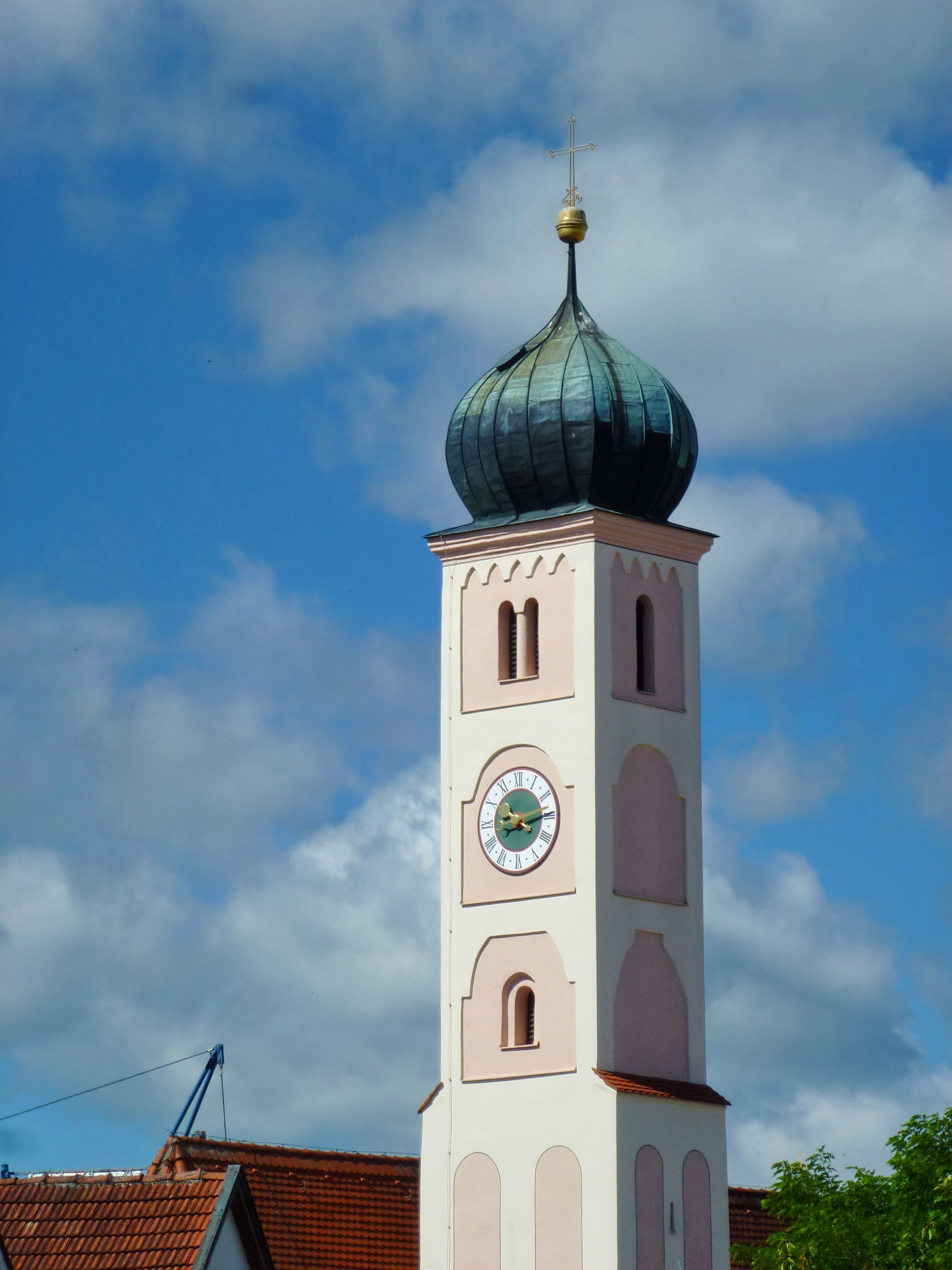 Zankenhausen, Pfarrkirche St Johann Baptist. Detail: Kirchturm